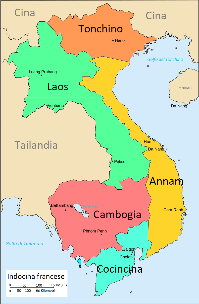 Versione italiana della carta rappresentante le suddivisioni dell'Indocina francese